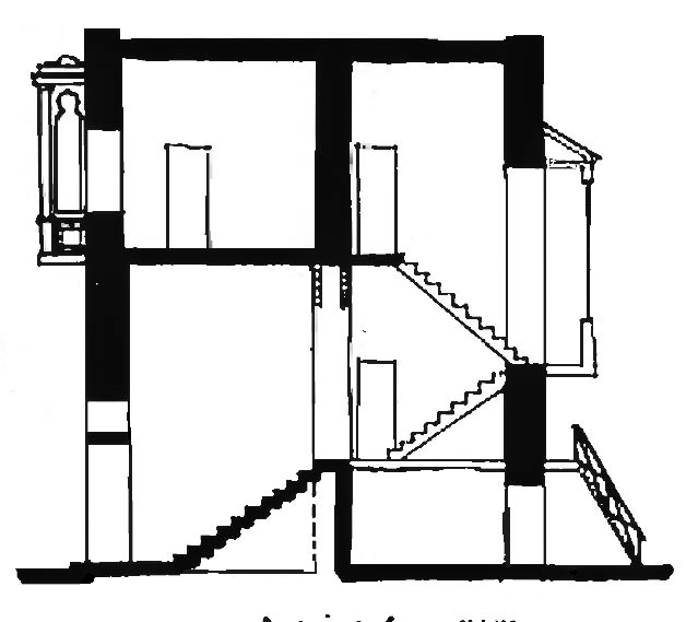 Ağabala Quliyevin evinin kəsimi